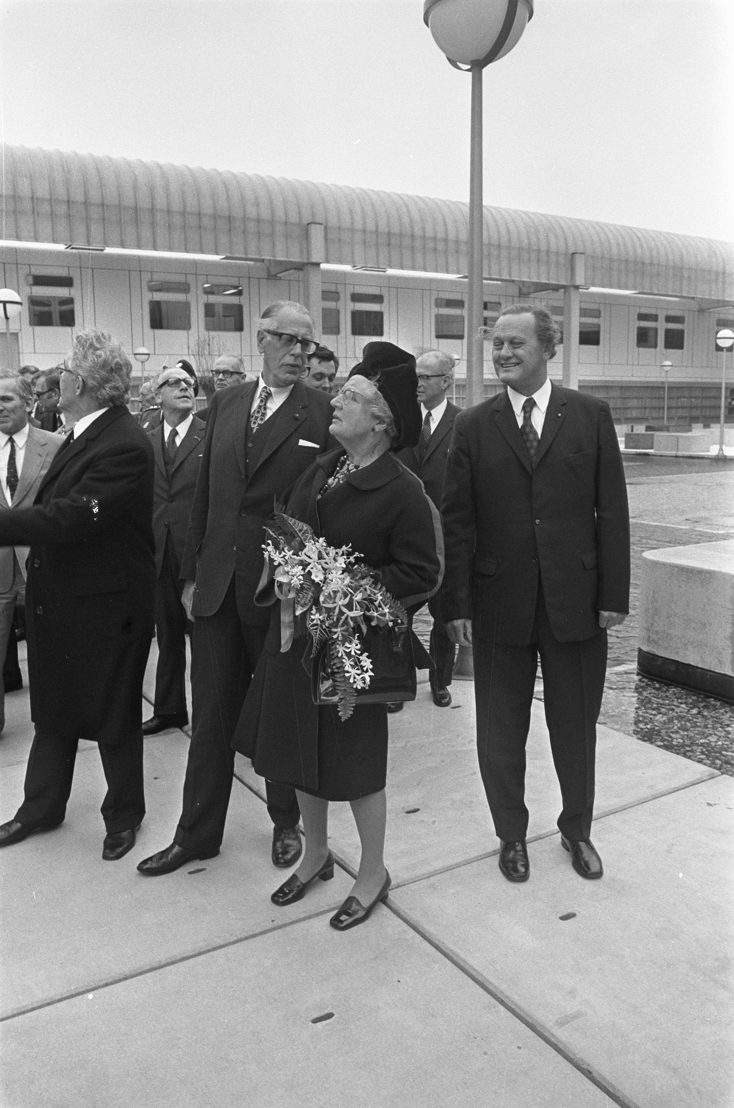 Collectie / Archief : Fotocollectie Anefo Reportage / Serie : Koningin Juliana opent de Erasmus Universiteit te Rotterdam Beschrijving : De koningin wordt rondgeleid Datum : 8 november 1973 Locatie : Rotterdam, Zuid-Holland Trefwoorden : koninginnen, openingen Persoonsnaam : Juliana, koningin Fotograaf : Bert Verhoeff / Anefo Auteursrechthebbende : Nationaal Archief Materiaalsoort : Negatief (zwart/wit) Nummer archiefinventaris : bekijk toegang 2.24.01.05 Bestanddeelnummer : 926-8129